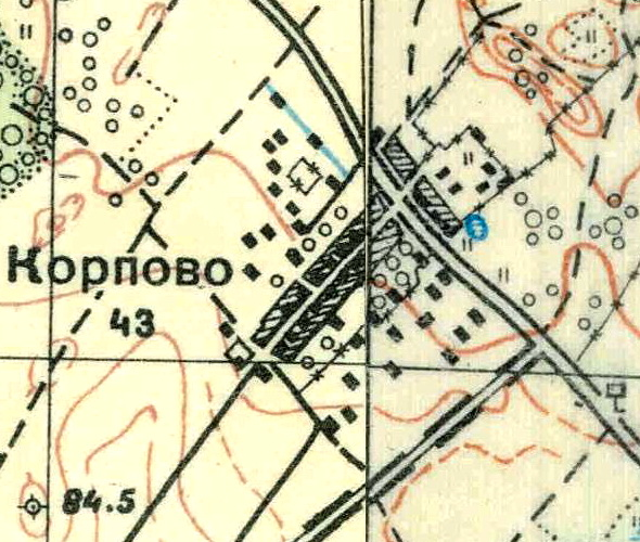 Топографическая карта Ленинградской области, квадрат О-35-22-Г-в (Мануйлово), деревня Корпово.